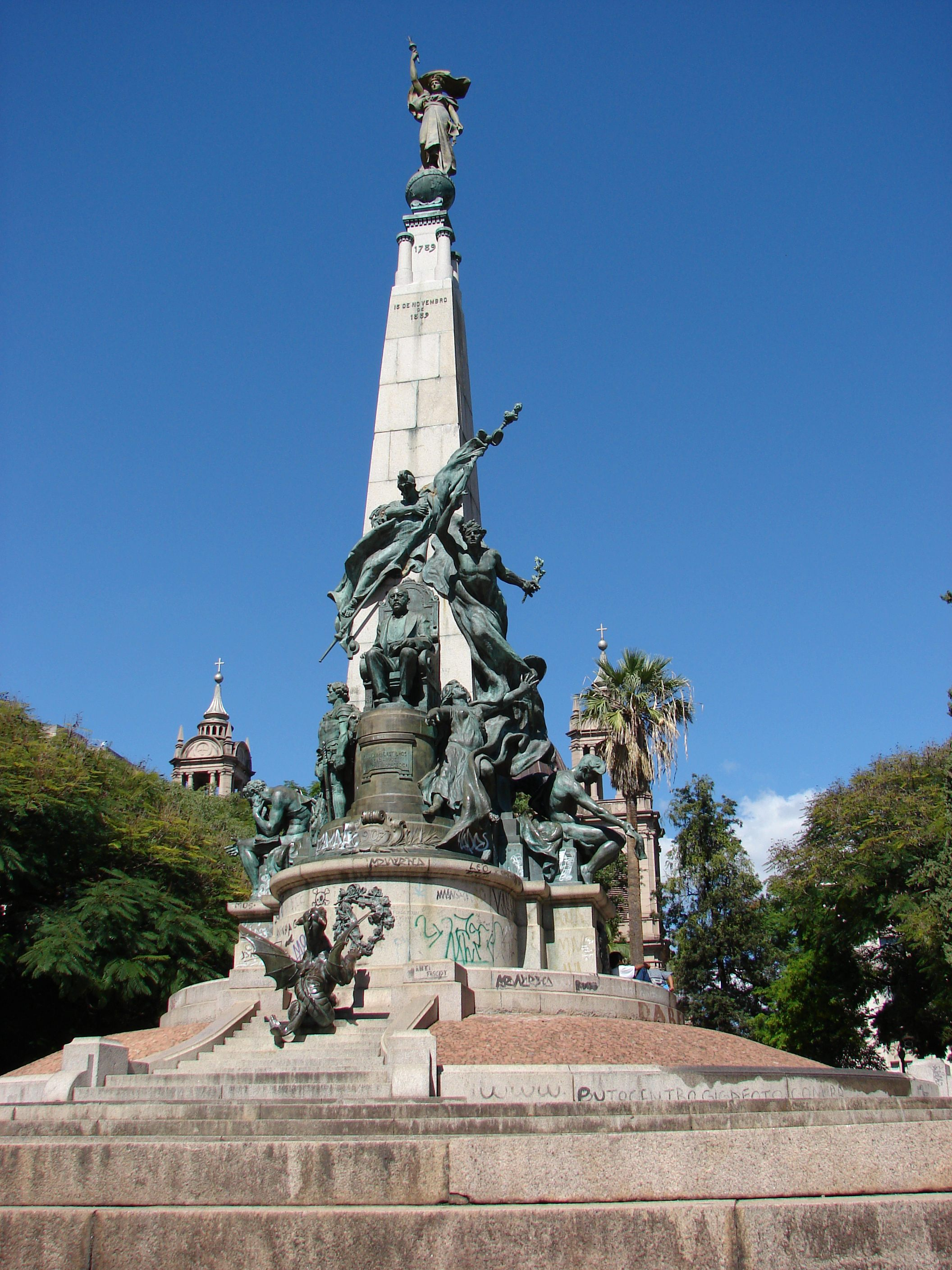 Julio de Castilhos monument in Porto Alegre, Brasil